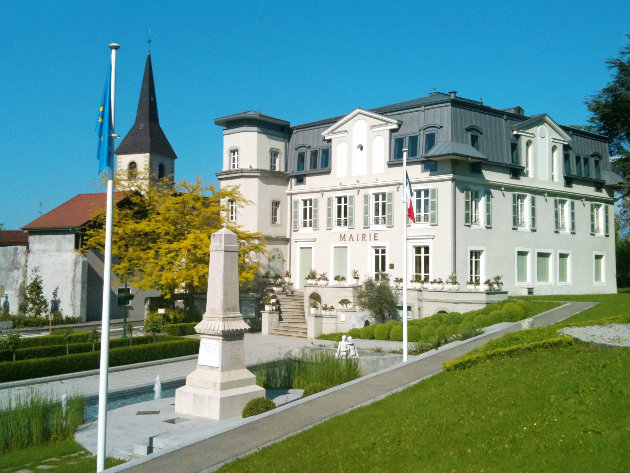 Mairie de Publier - Amphion-les-Bains, Haute-Savoie, 74, France